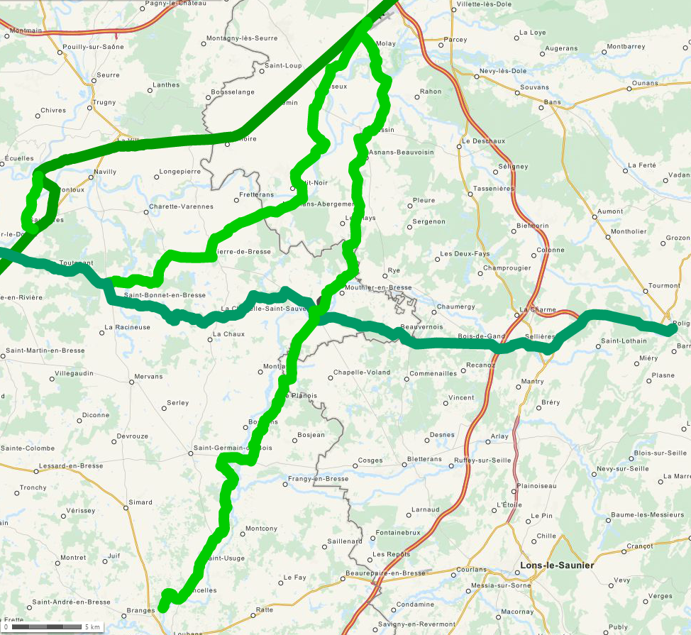 Karte der Römerstrasse von Louhans nach Tavaux über Bellevesvre Carte de la voie romaine de Louhans à Tavaux par Bellevesvre This map may be incomplete, and may contain errors. Don't rely solely on it for navigation.